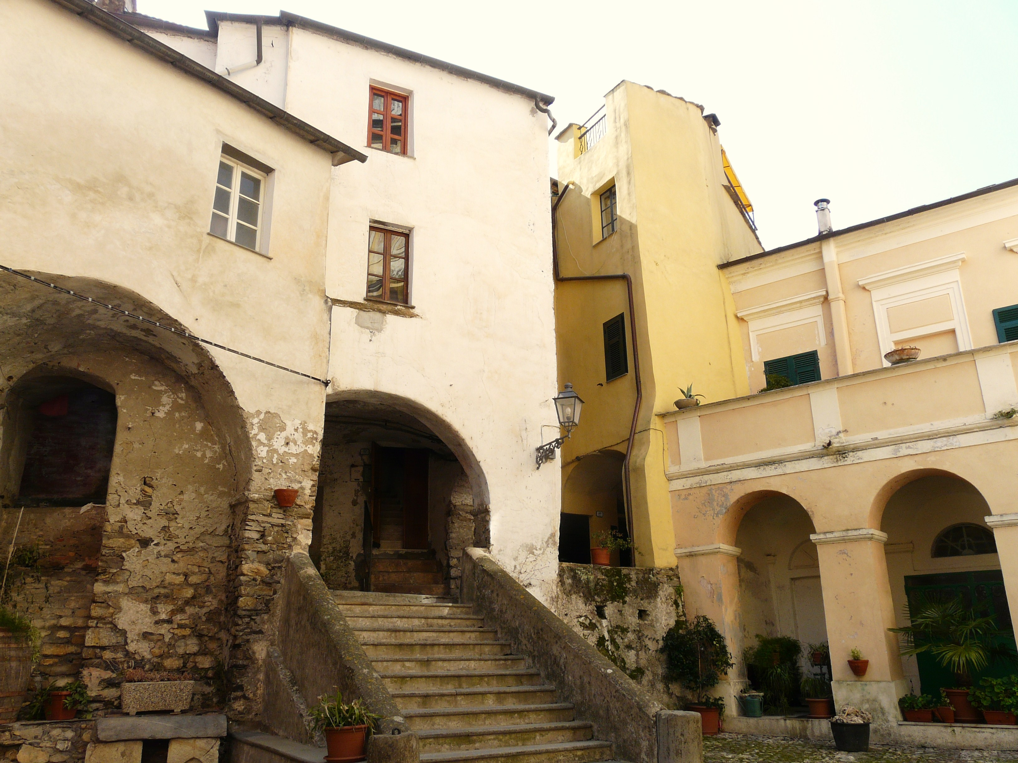 Chiesa di San Tommaso, Dolcedo, Liguria, Italia